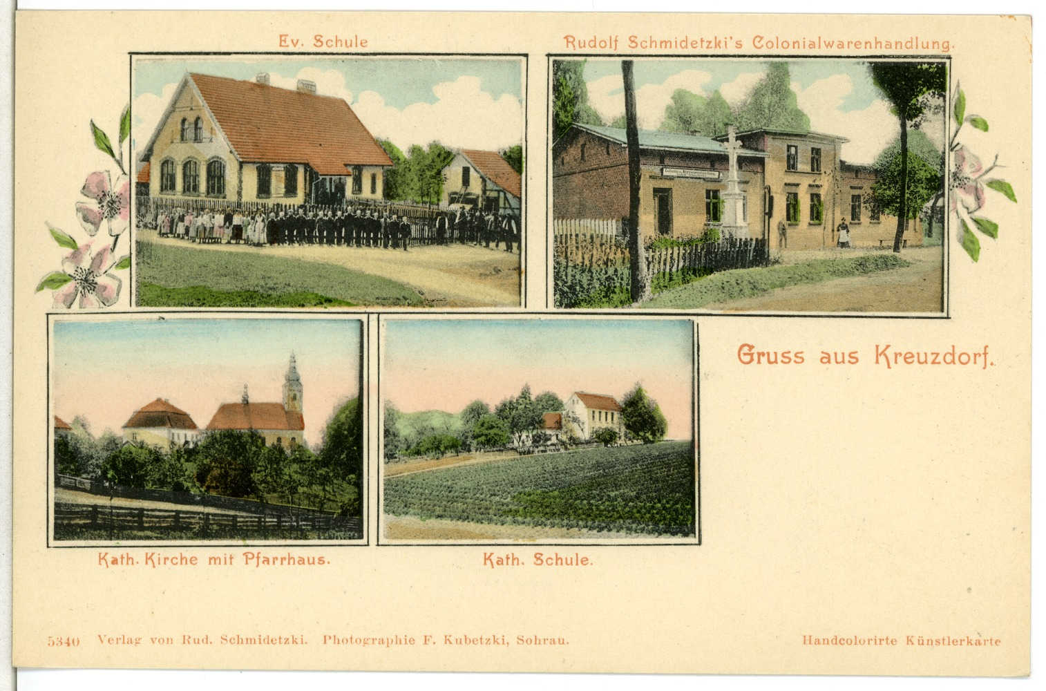 Krzyżowice (Kreuzdorf); Schulen, Kirche und Pfarrhaus, Colonialwarenhandlung This postcard is from publisher Brück & Sohn in Meißen ( postcard has a unique number 05340 and is available in a higher resolution at the publisher. This images was uploaded in a cooperation project between Wikipedians and the publisher.